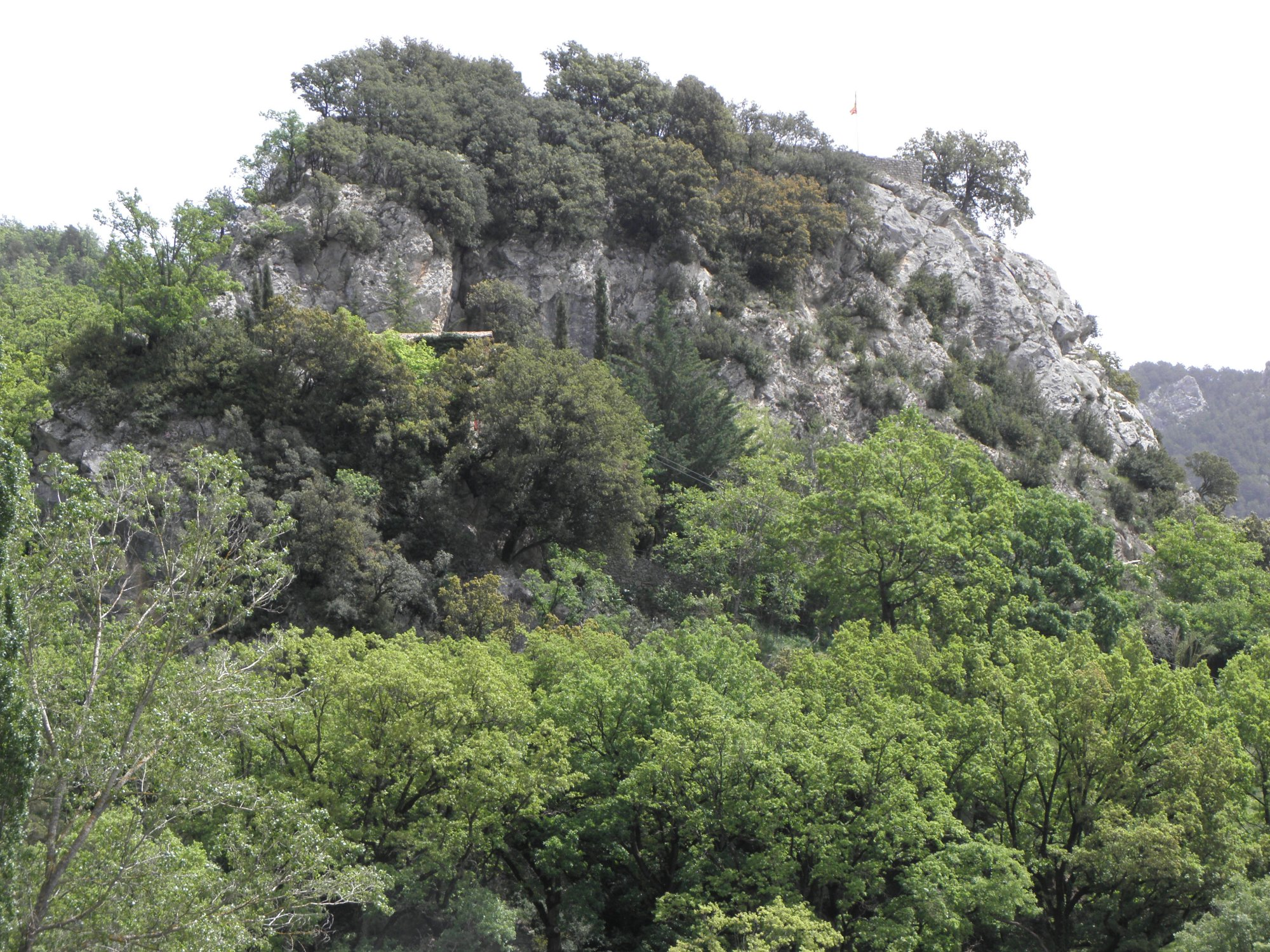 El Roc de la Pedra (la Coma i la Pedra) a la Vall de Lord (Solsonès) vist des de ponent. Al cim s'hi poden veure les restes restes del Castell de la Pedra.